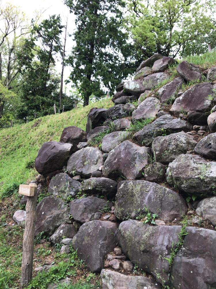 興国寺城石垣